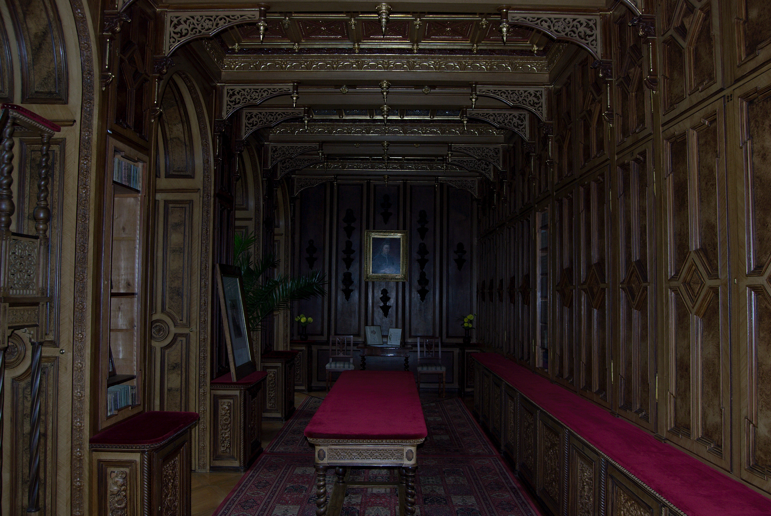 Zámek Lysice - knihovna Marie von Ebner-Eschenbachové